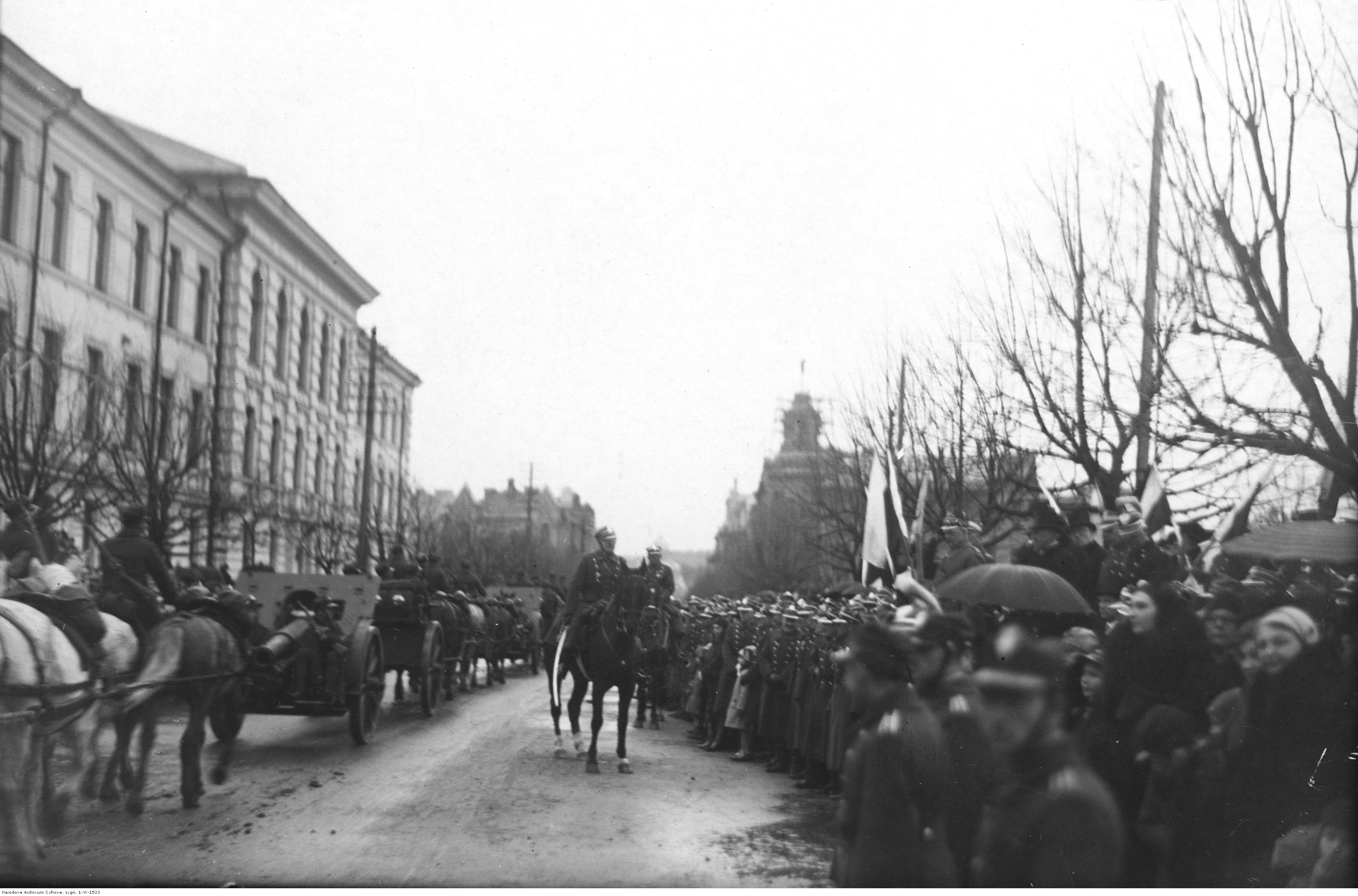 Defilada ciężkich dział 3 Pułku Artylerii Ciężkiej na ulicach Wilna. Defiladę przyjmuje gen. Lucjan Żeligowski. Koncern Ilustrowany Kurier Codzienny - Archiwum Ilustracji. Sygnatura: 1-W-1523